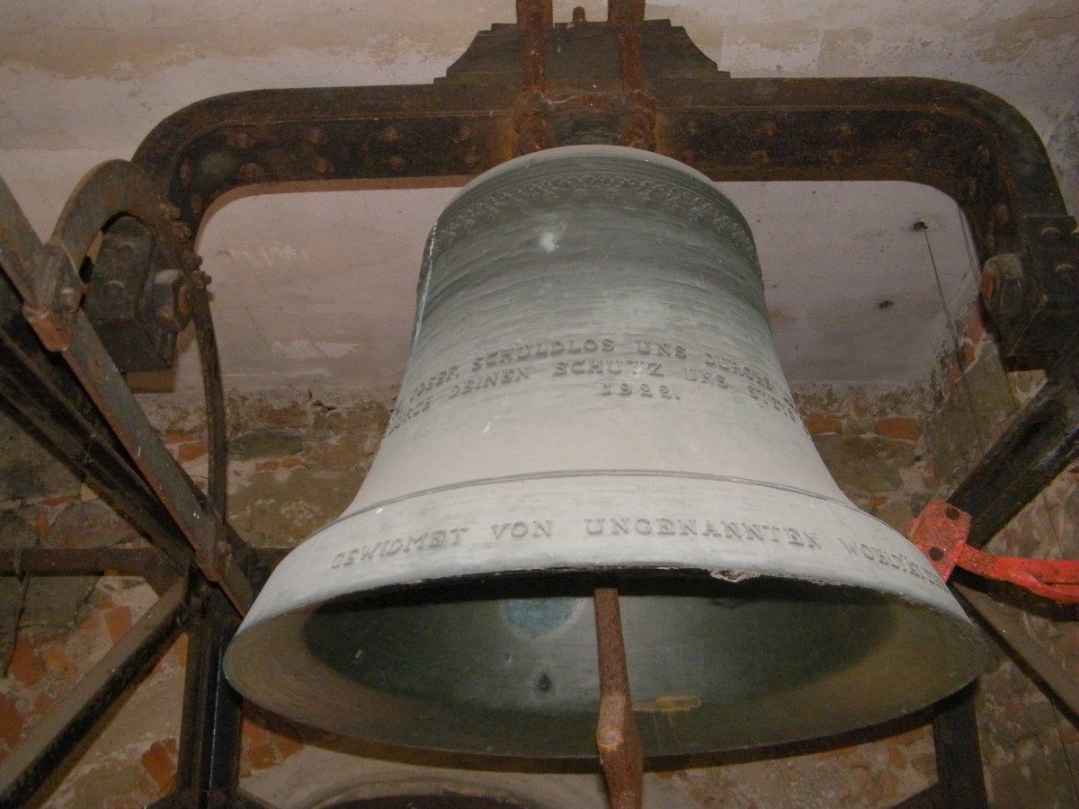 Zvon svatý Josef v kostele Navštívení Panny Marie v Lobendavě